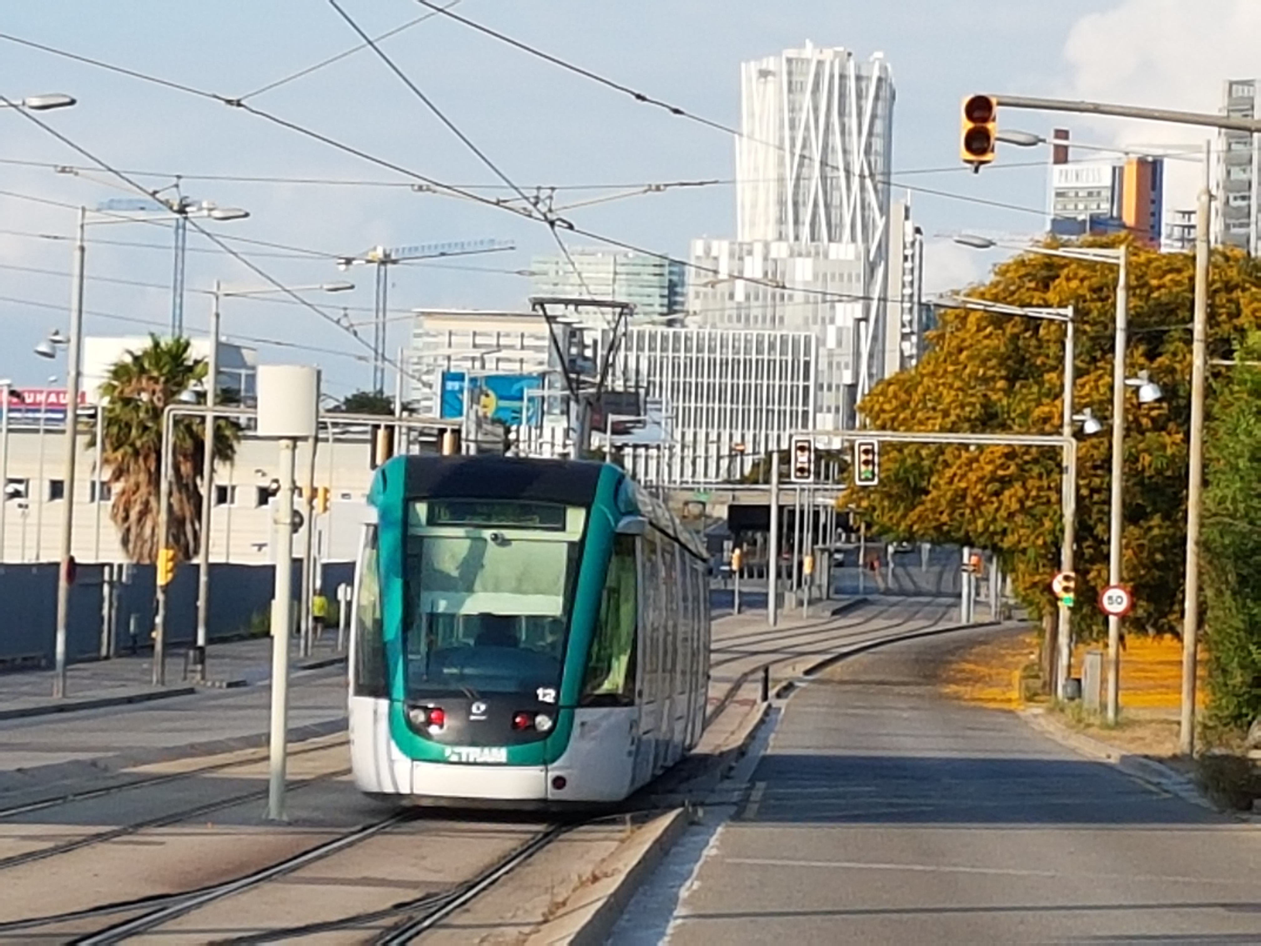 Tramvia de la línia T6 destinació Glòries entre Estació de Sant Adrià i Port Fórum, a l'Av. Eduard Maristany (Sant Adrià de Besòs)